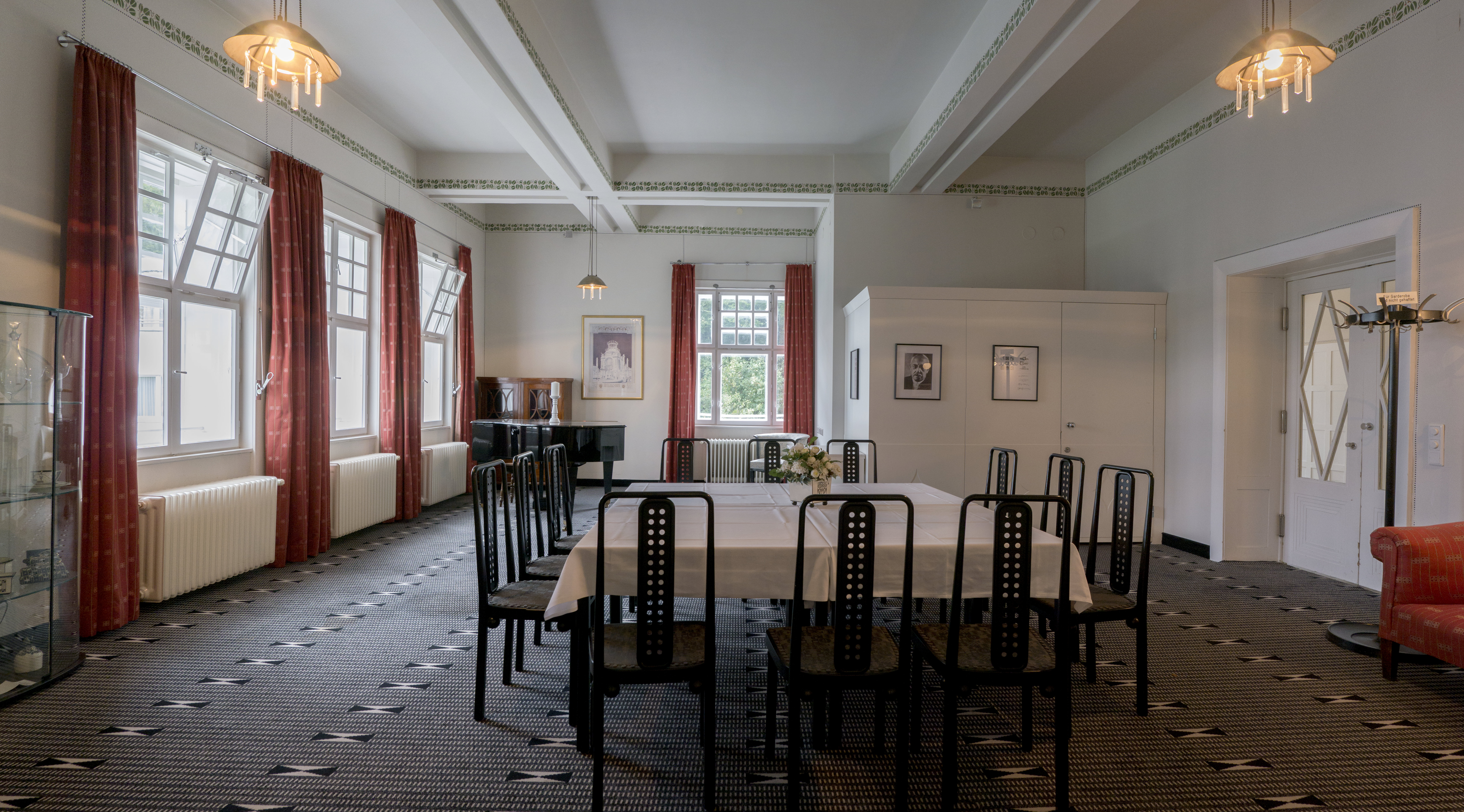 Ehemaliges Sanatorium Westend